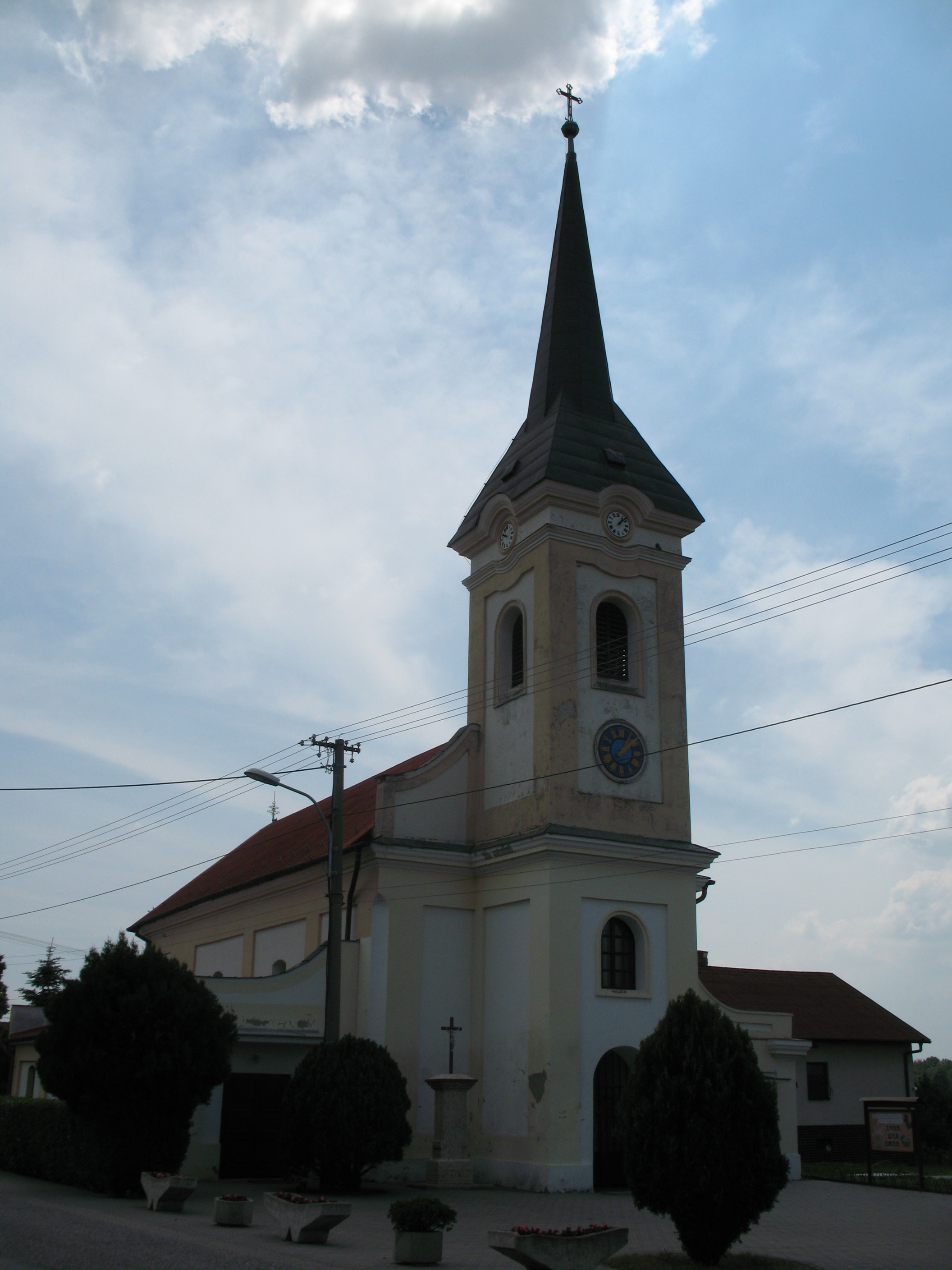 Özdogei Szt. András templom